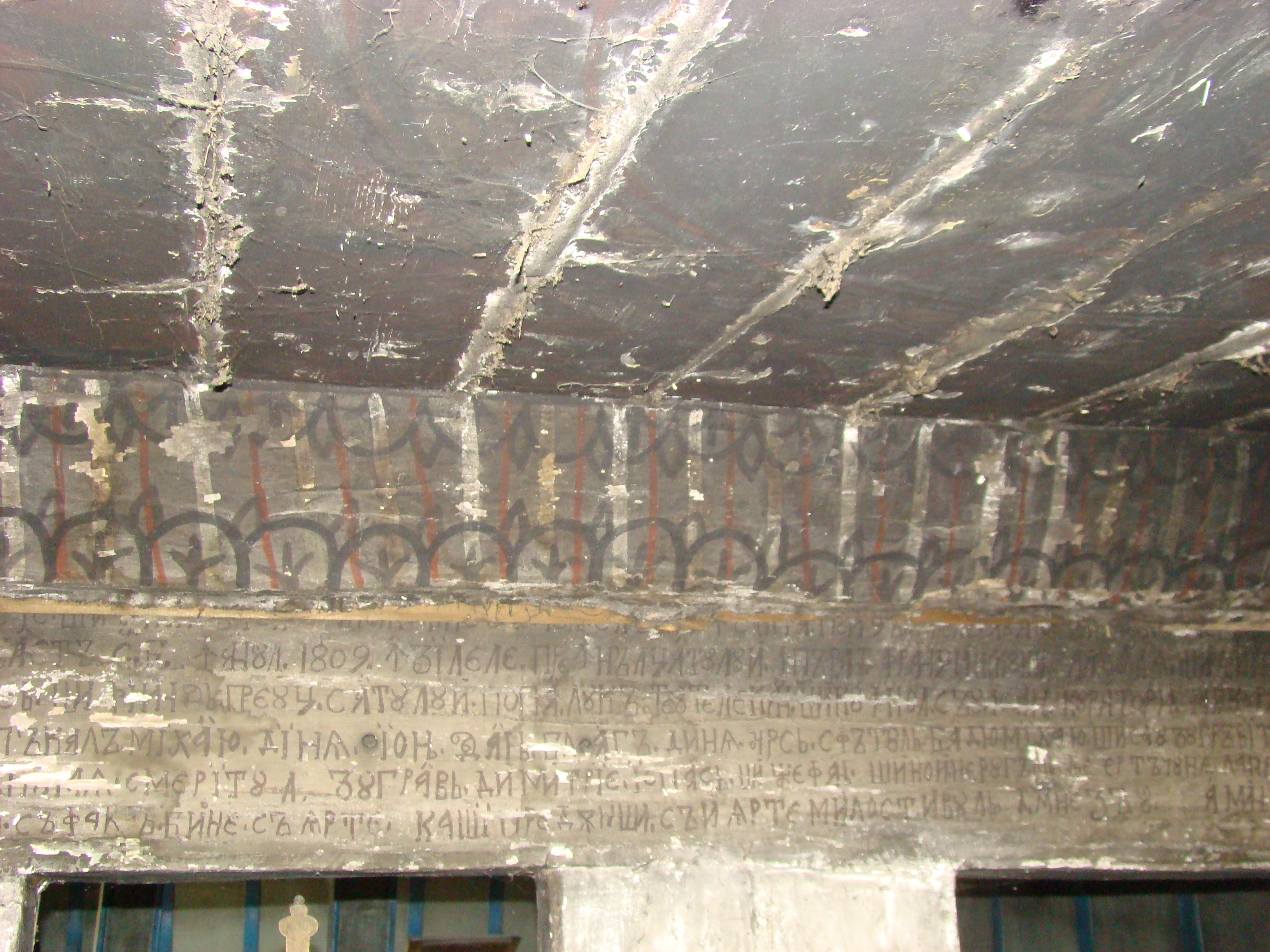 Biserica de lemn „Sfinții Arhangheli” din Păniceni, județul Cluj